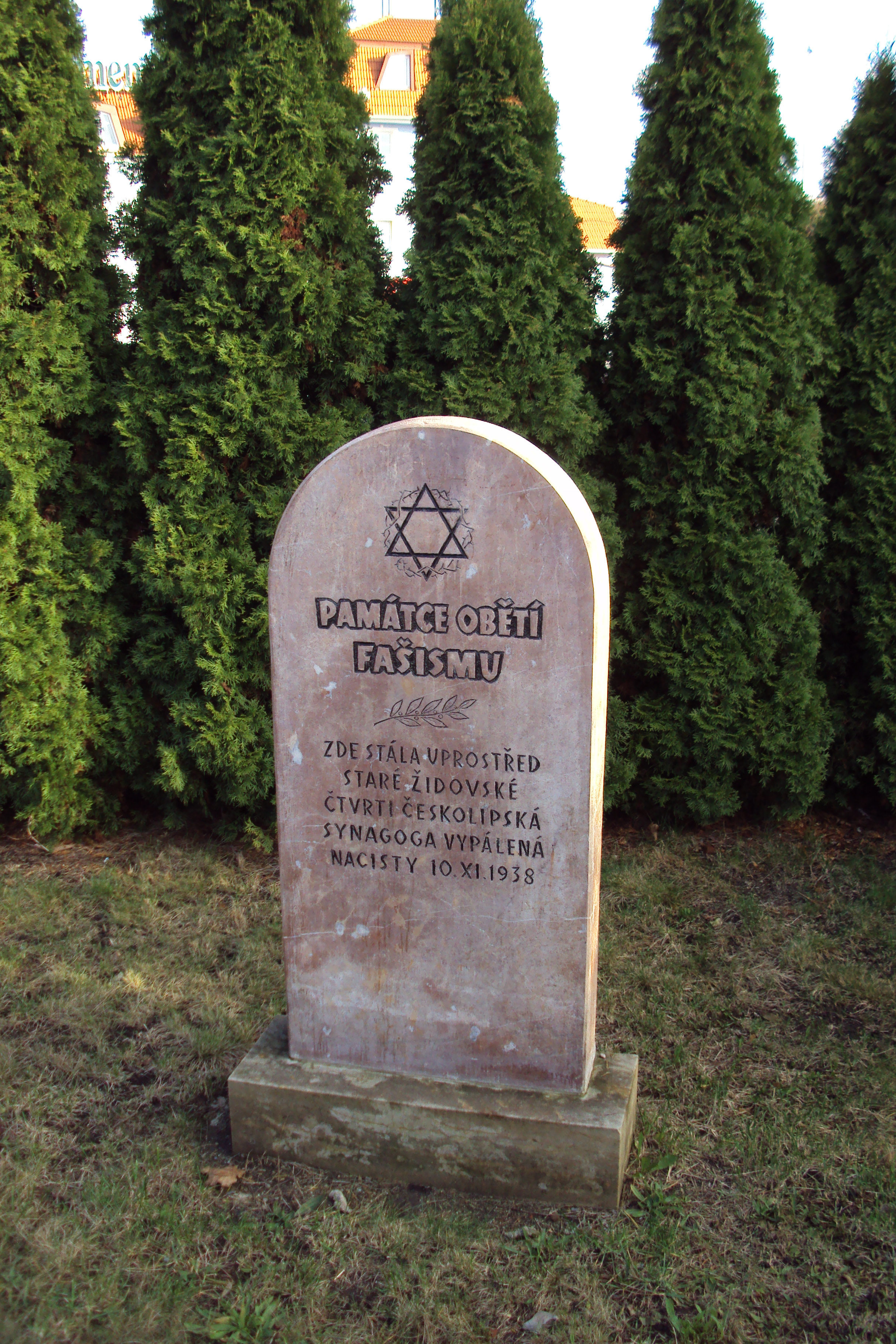 Památník židovských obětí fašismu v České Lípě poblíž hradu